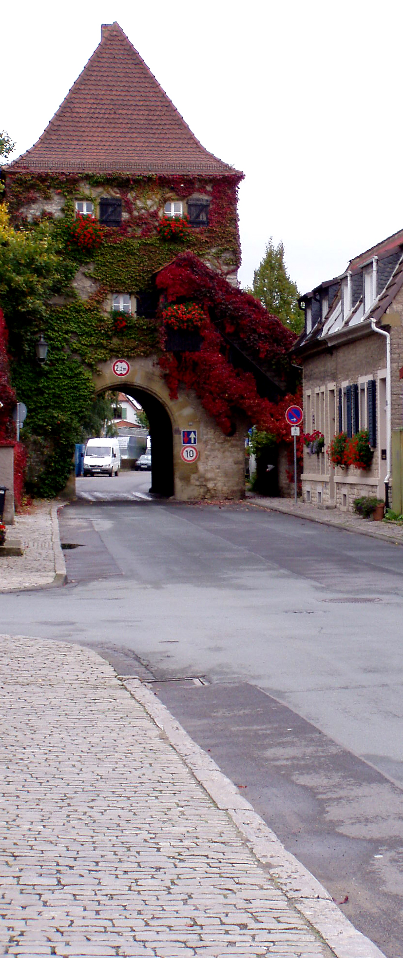 Das Großlangheimer Tor (der Bartelsturm) im Kitzinger Stadtteil Etwashausen